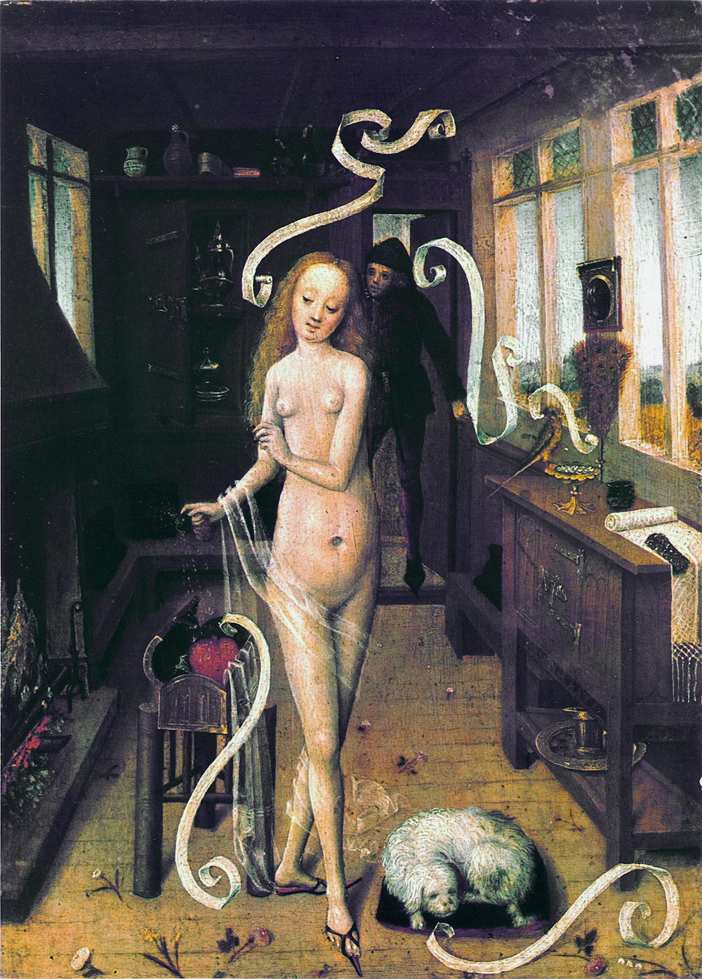 LiebeszauberThe love spelltitle QS:P1476,de:"Liebeszauber" label QS:Lde,"Liebeszauber" label QS:Len,"The love spell"